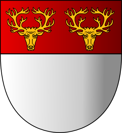 Escudo de Armas de la Familia Popham